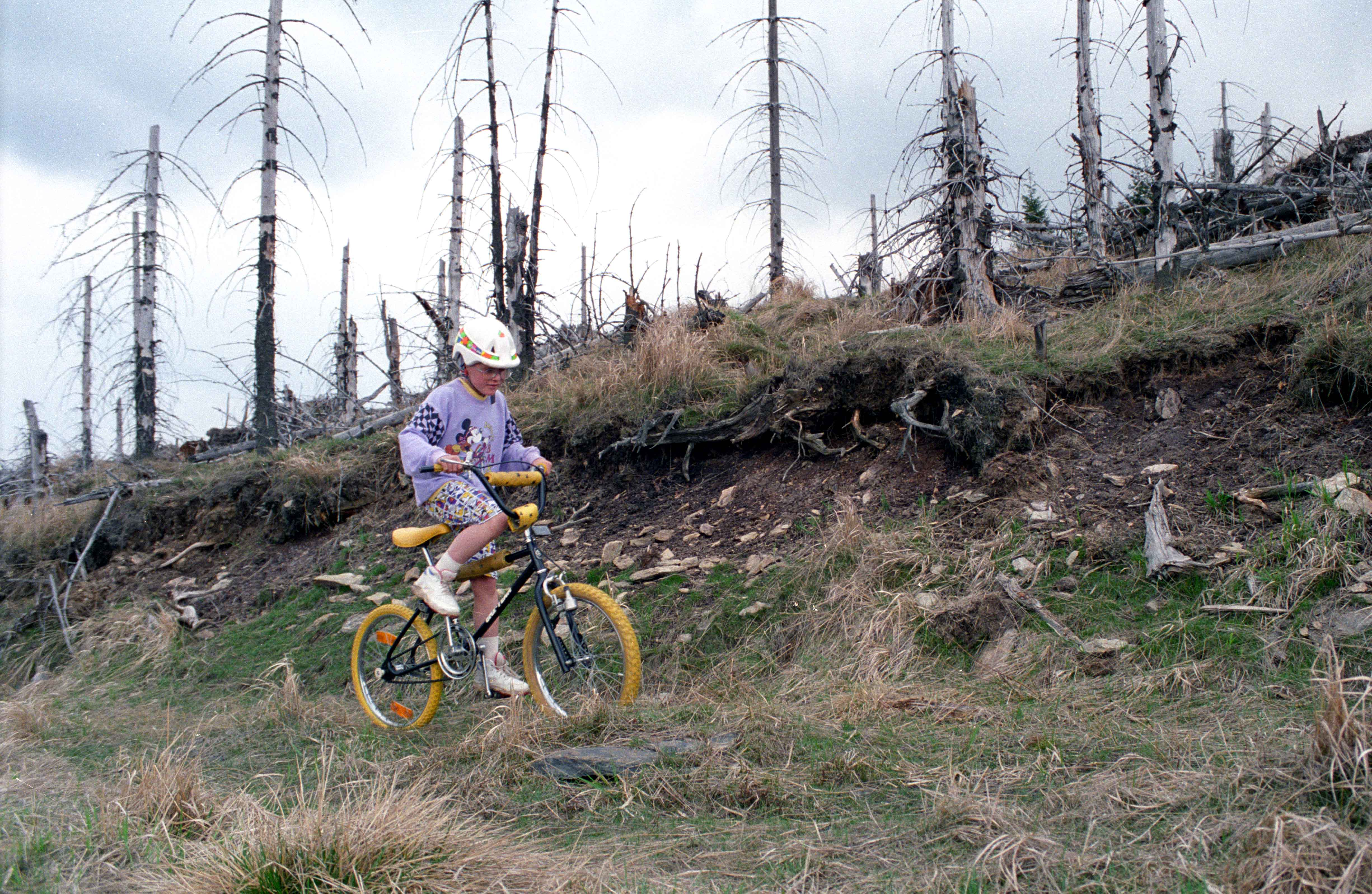 1995, nahe Reitzenhain im Erzgebirge (an der Grenze zu Tschechien) 1995 hatte unser Sohn Denny als Schulaufgabe über Umweltschäden in der näheren Umgebung zu berichten … und dies zu dokumentieren. Kurze Zeit davor wurden wir diesbezüglich bei einer Wandertour mit unschönen Anblicken konfrontiert. Daraufhin sind wir noch einmal nach Reitzenhain im Erzgebirge (an der Grenze zu Tschechien) gefahren. Ich wollte dort zur Dokumentation den abgestorbenen Wald im Bild festhalten … und mit Denny‘s Bruder Toni auf dem Fahrrad einen Kontrast schaffen. Vielleicht hat sich der Wald heute – nach 20 Jahren – wieder erholt!